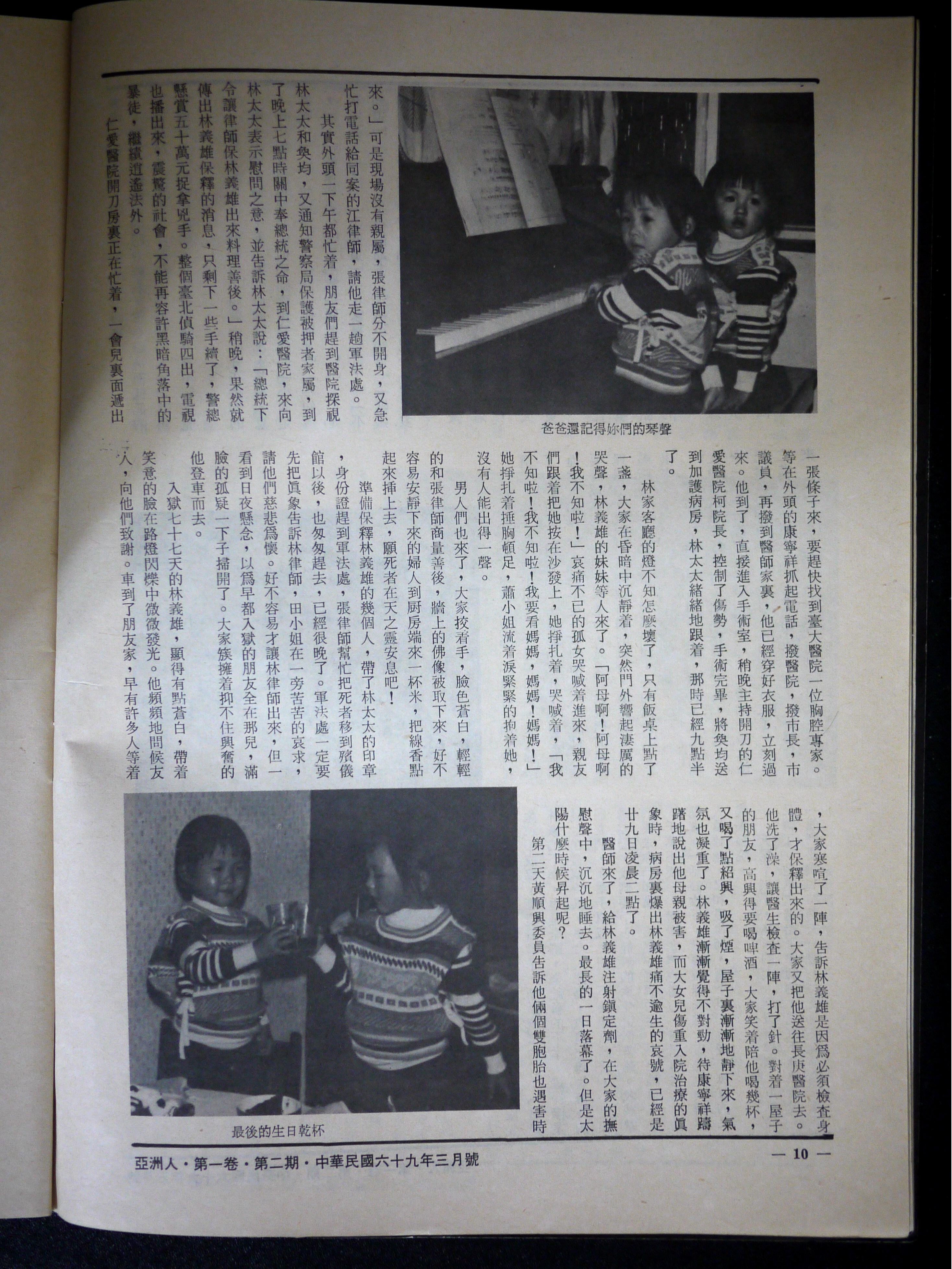 中文（台灣）: 林亮均與林亭均生前照。翻攝自《亞洲人》雜誌第2期。該雜誌被當時的警備總部查禁，所以無版權問題。查禁政府公報請參見： 函知「亞洲人」雜誌第1卷第2期依法查禁。